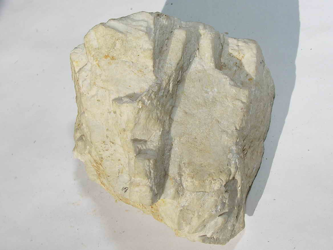 albita, albita